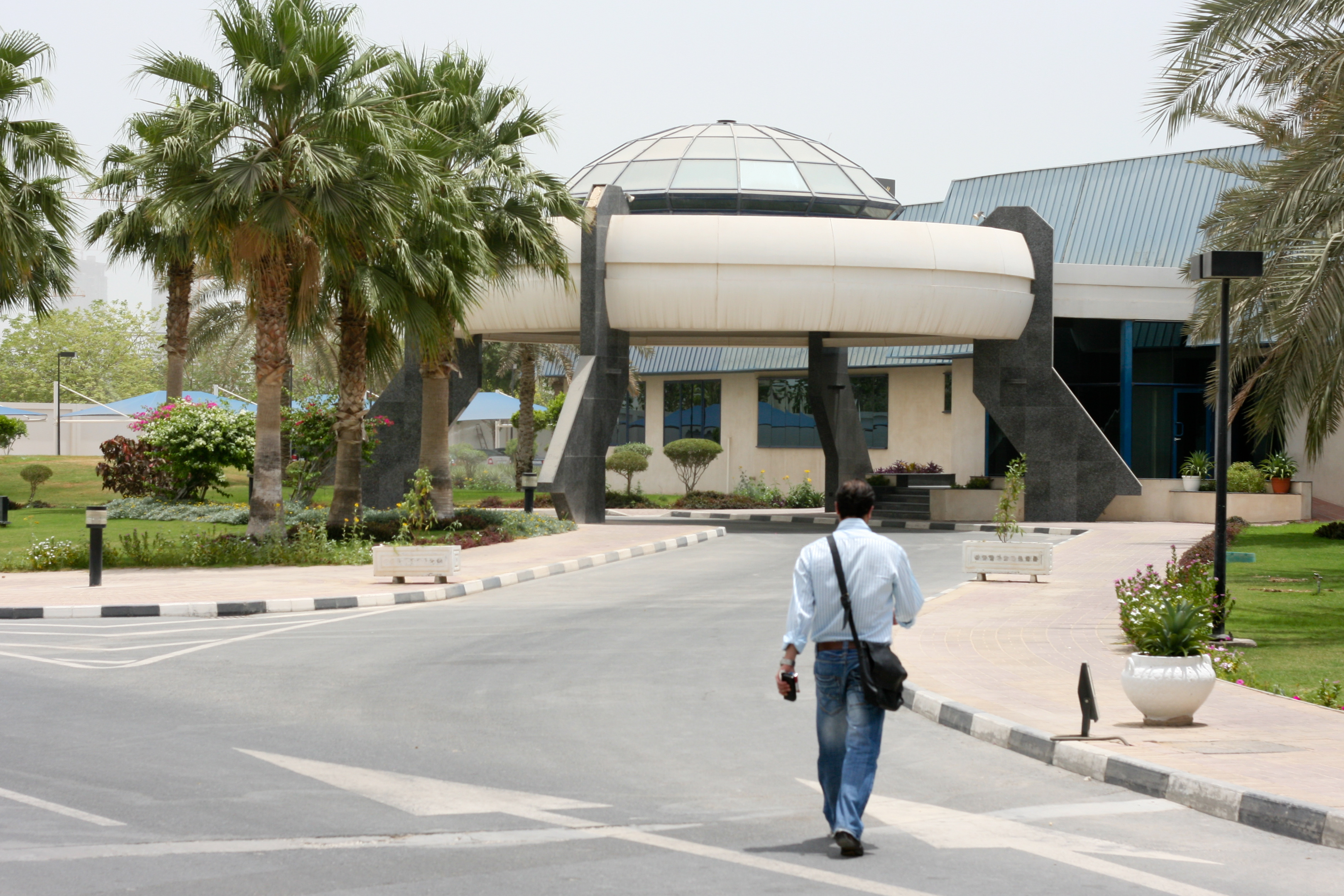 Al Jazeera building in Doha, Qatar.